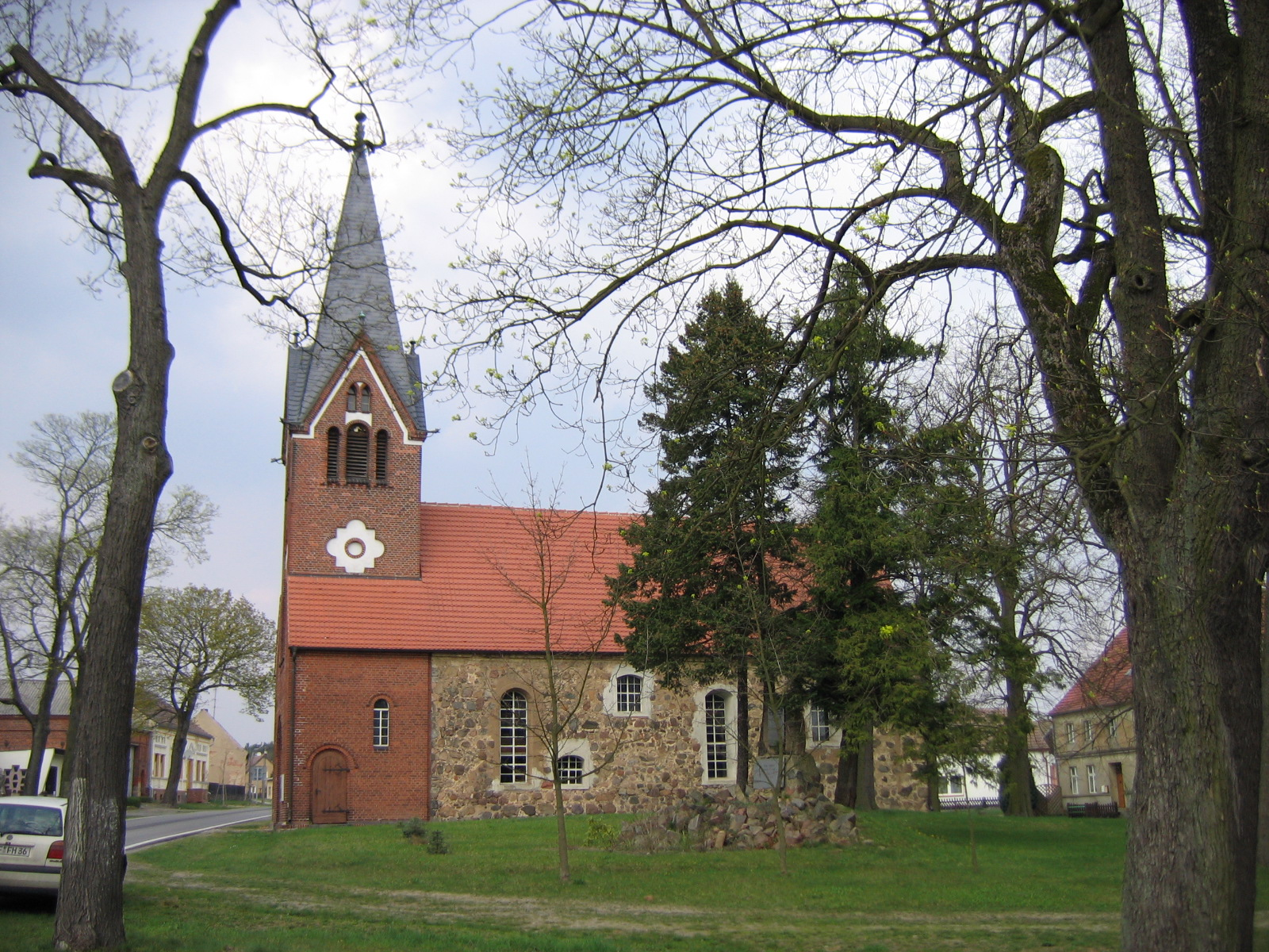 Dorfkirche Buckow, Ortsteil von Baruth/Mark, Brandenburg Deutschland, Südseite